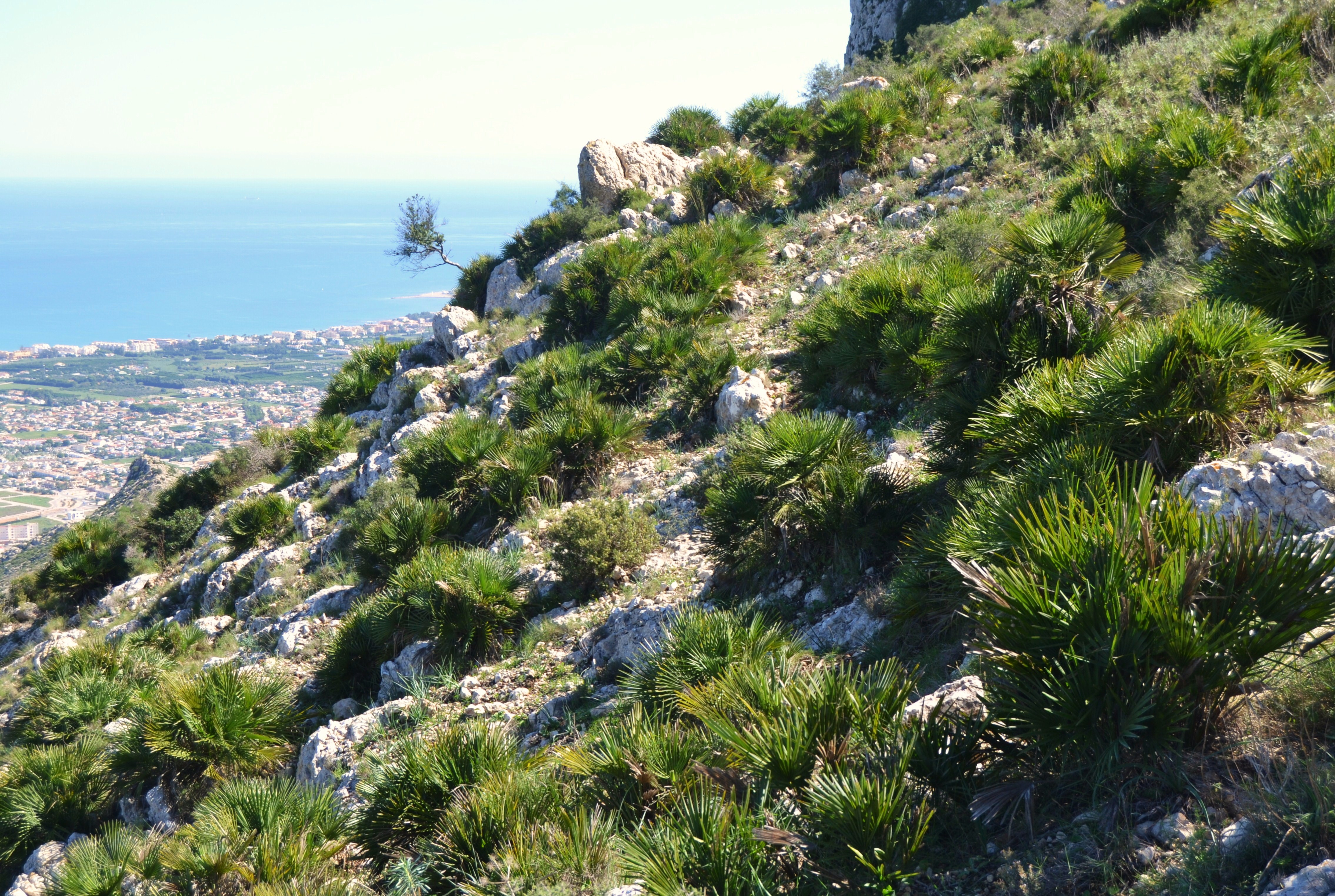 Margallonar a la serra de Segària.